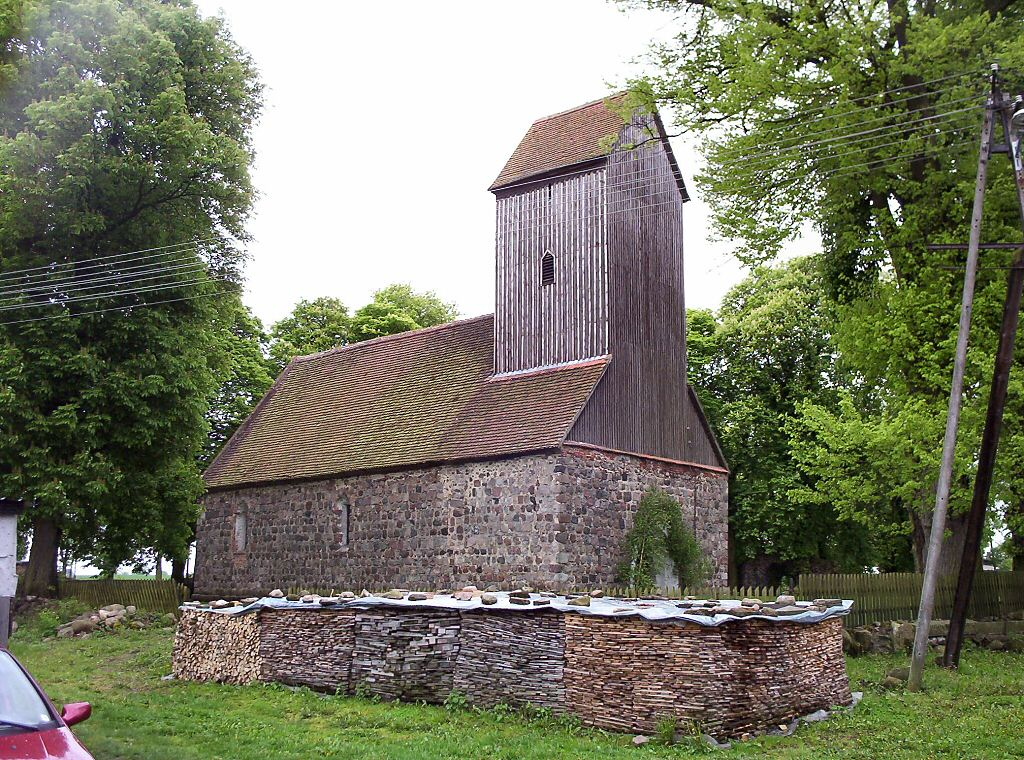 Laskowo - rzymskokatolicki kościół filialny p.w. Najświętszego Serca Pana Jezusa, 2 poł. XIII